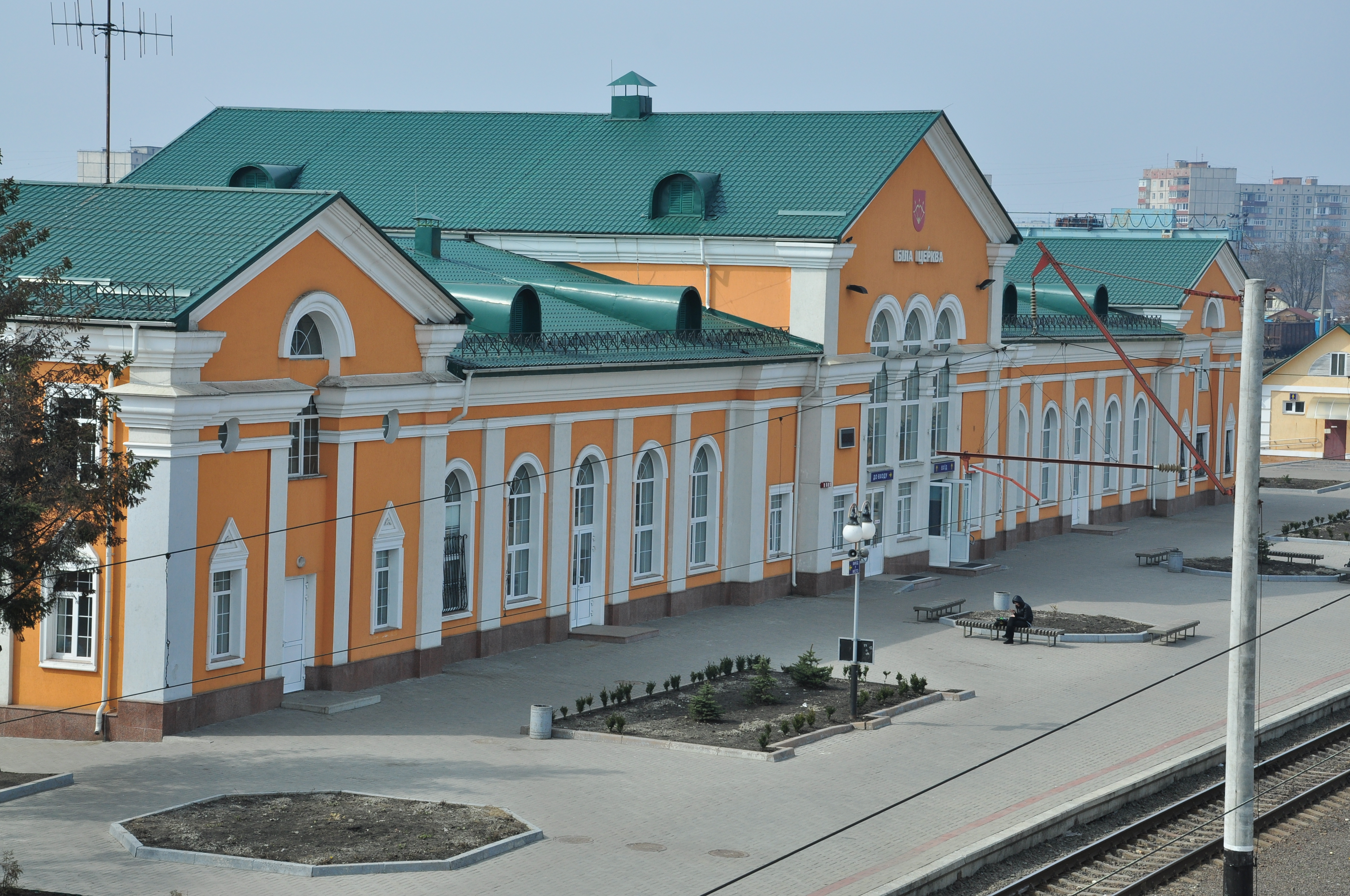 Залізничний вокзал Біла Церква